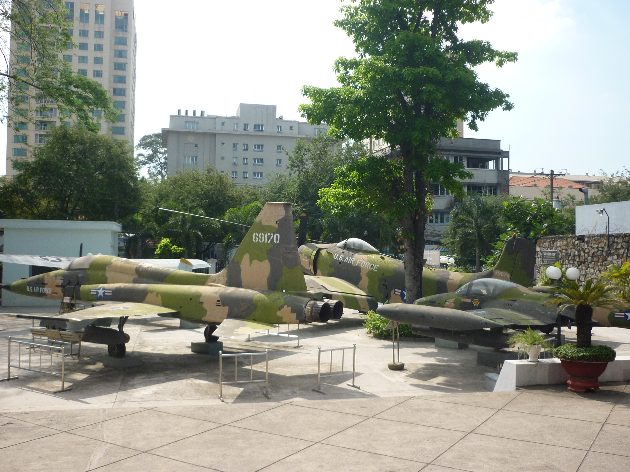 Khu trưng bày máy bay Mỹ sử dụng trong chiến tranh Việt Nam